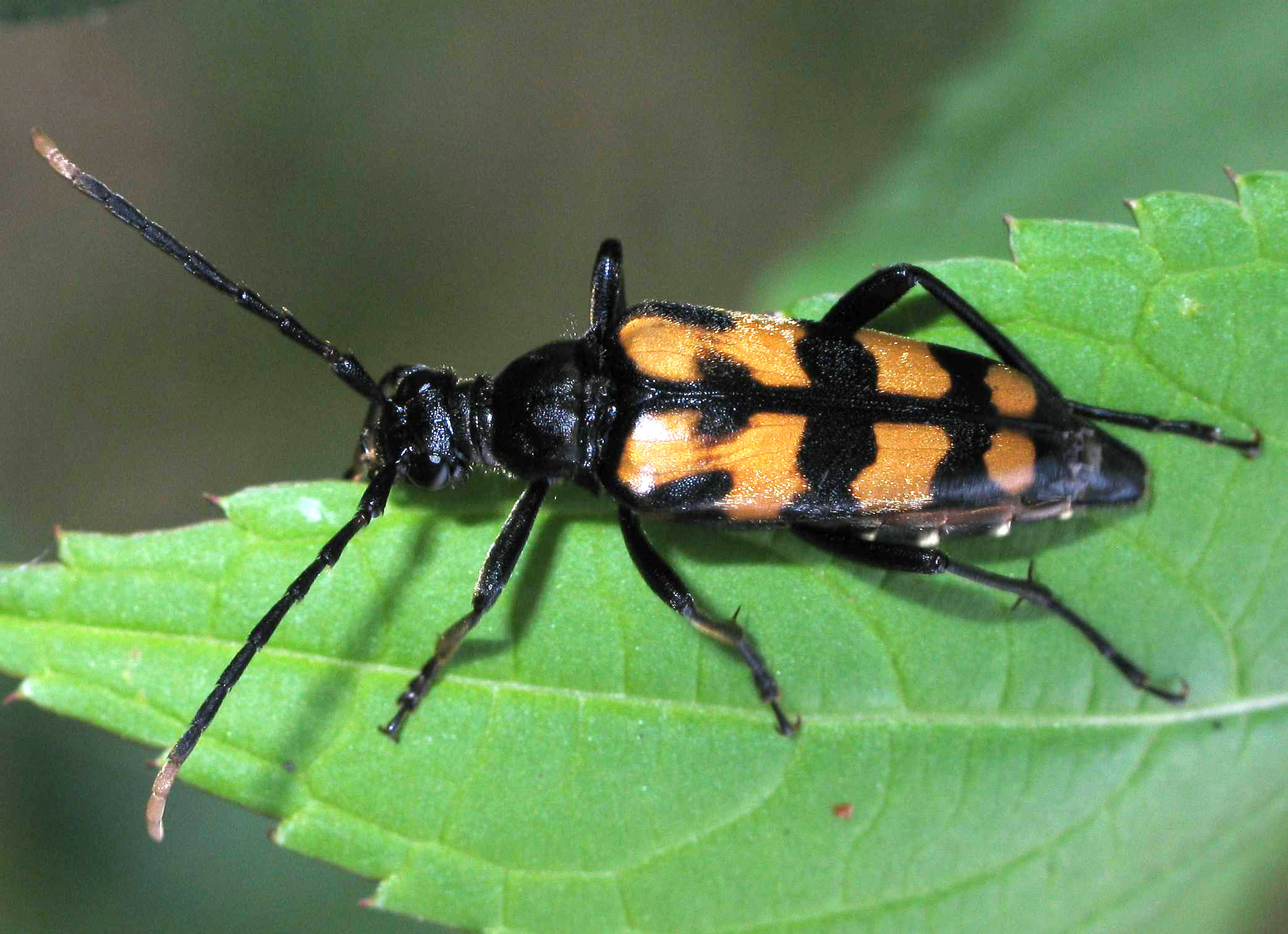 Vierbindiger Schmalbock (Strangalia quadrifasciata), Hamburg, Northern Germany